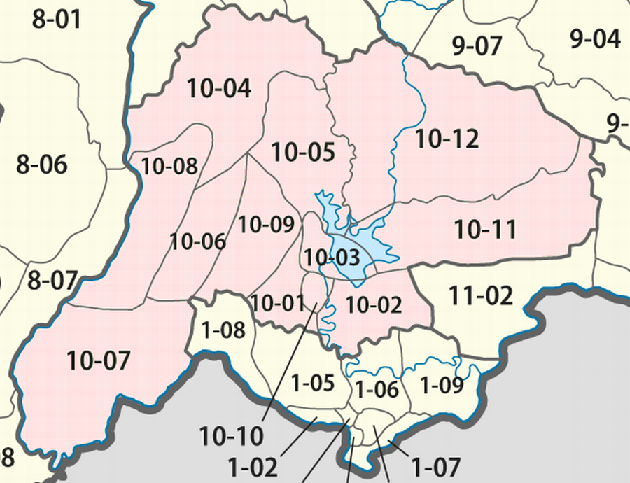 Giấy phép